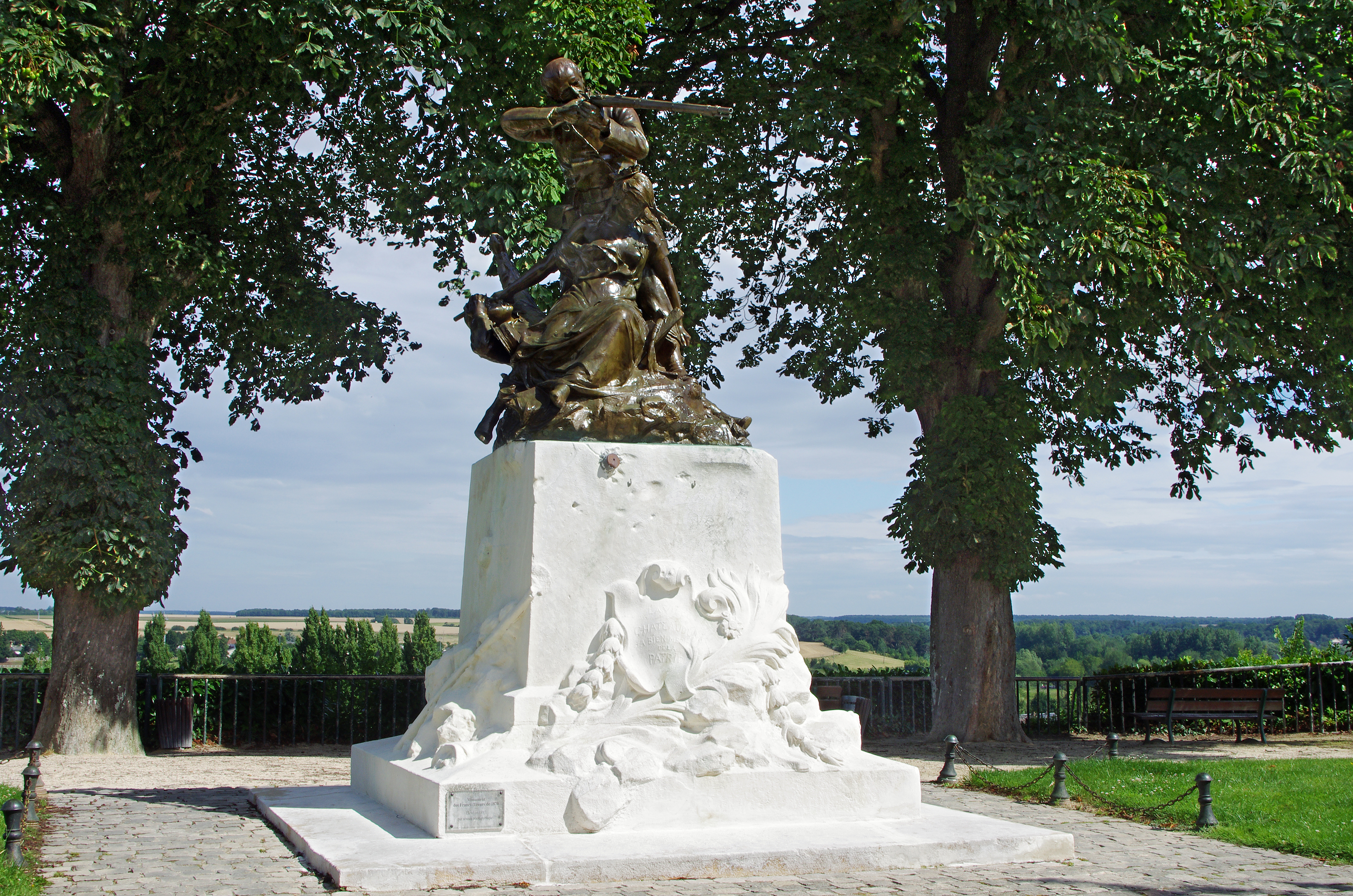 Châteaudun (Eure-et-Loir), France. Monument commémoratif de la guerre de 1870. Le 18 octobre 1870, près de 1200 francs-tireurs et gardes nationaux affrontent une division prussienne dix fois plus nombreuse. La statue d'Antonin Mercié, élevé en 1897, par souscription publique, rend hommage à la mémoire des défenseurs de Châteaudun.